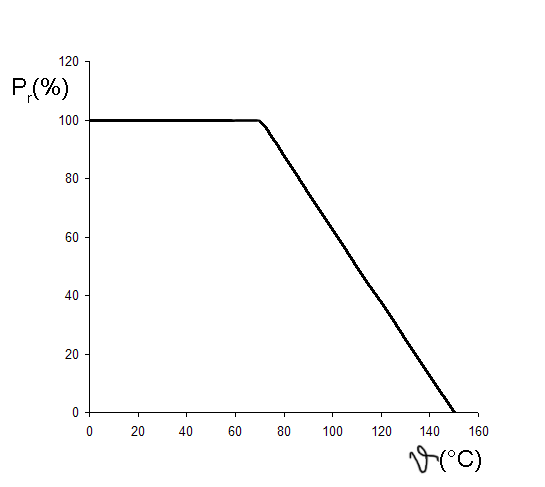 pomerne prevadzkove zatazenie rezistora v zavislosti od teploty okolia